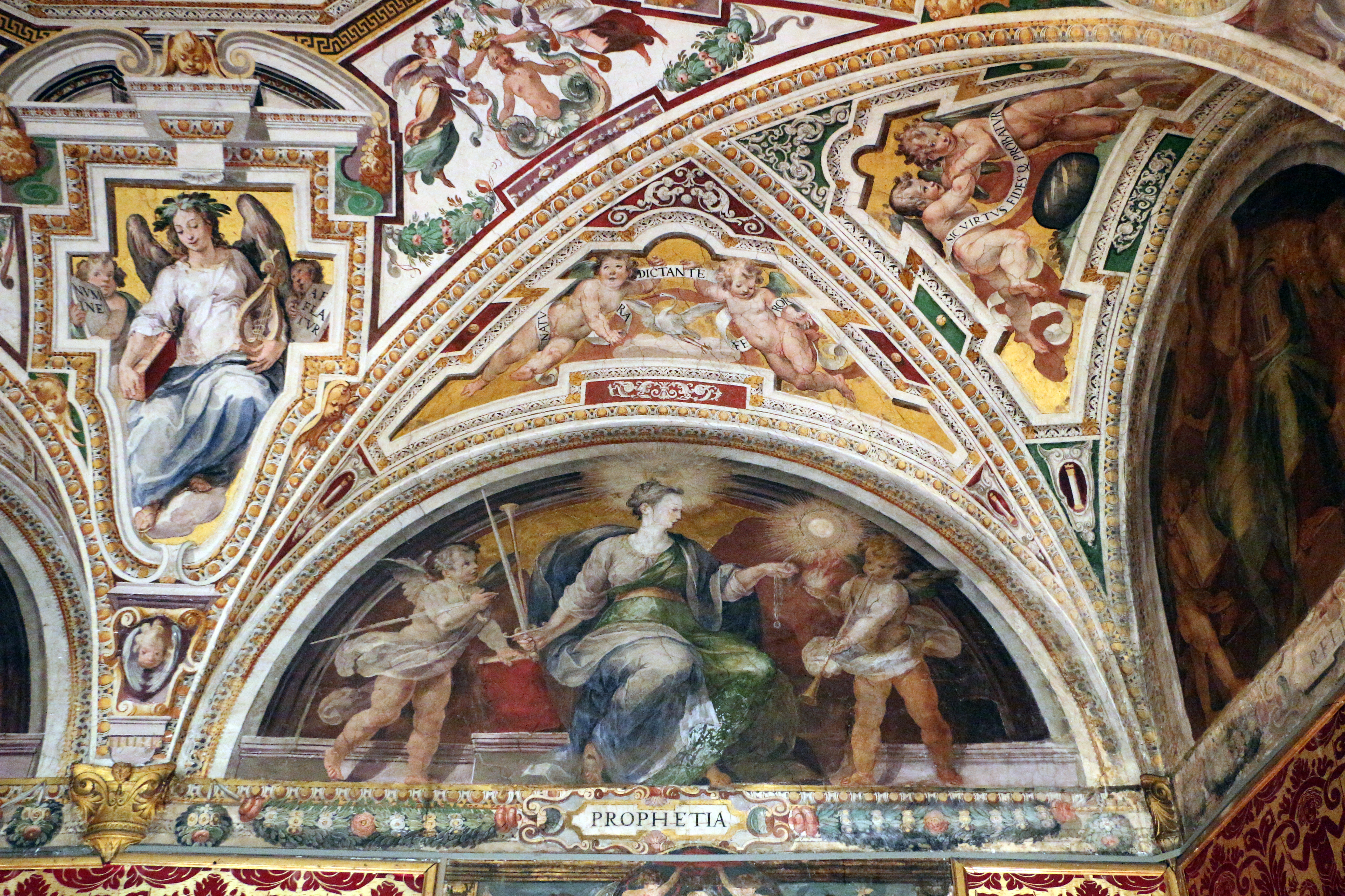 Palazzo colonna, appartamento della principessa isabelle, sala dell'alcova, affreschi di cristoforo pomarancio e scuola 02.JPG